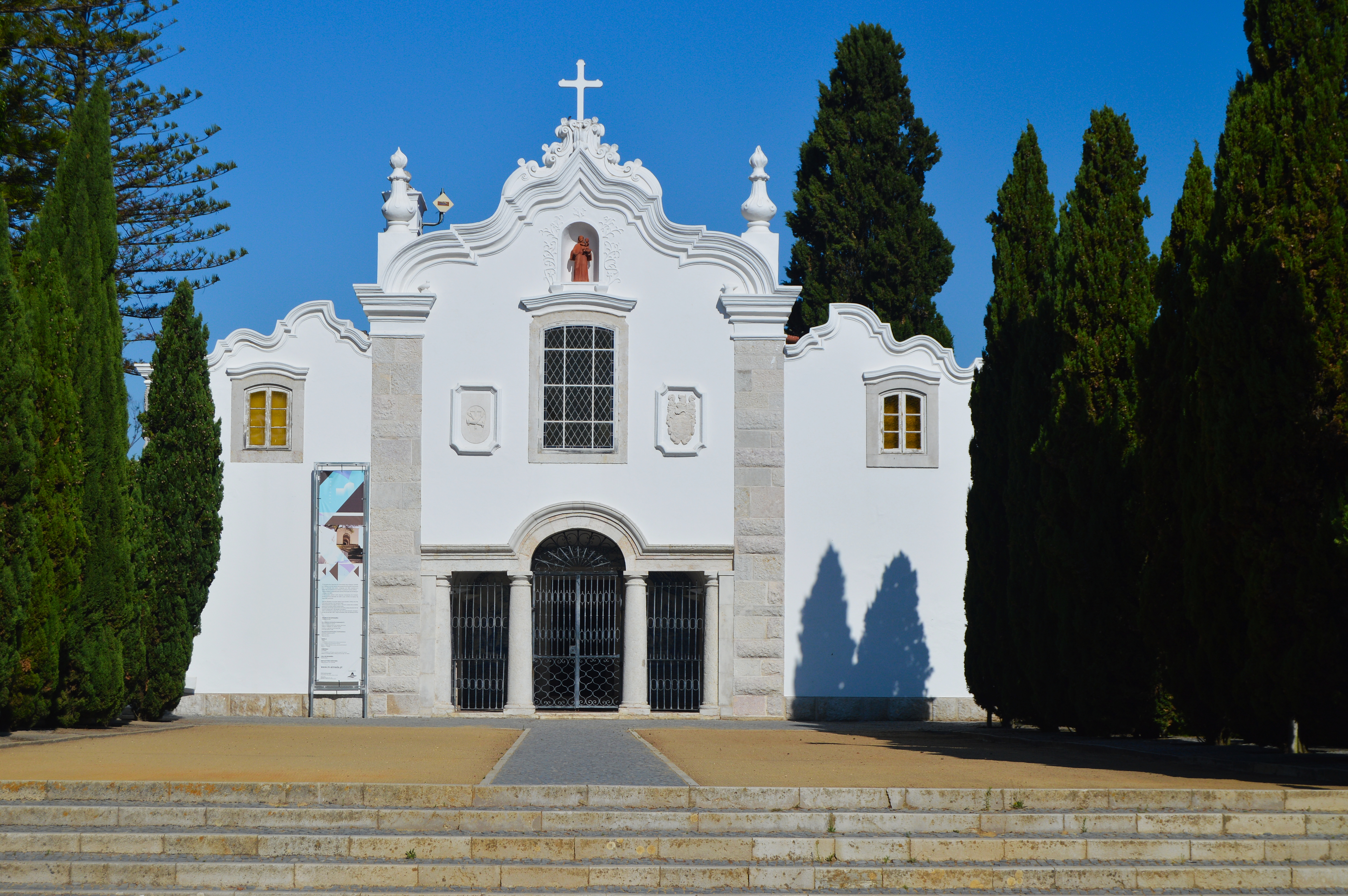 Convento dos Capuchos, Costa de Caparica, Almada, Portugal